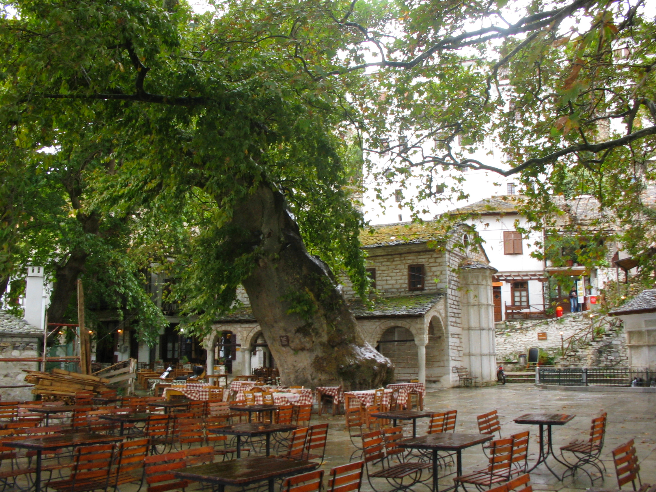 Деревня Макриница на полуострове Пилио, Греция. Центральная площадь, платан и типичная пелионская церковь-базилика с открытым притвором.